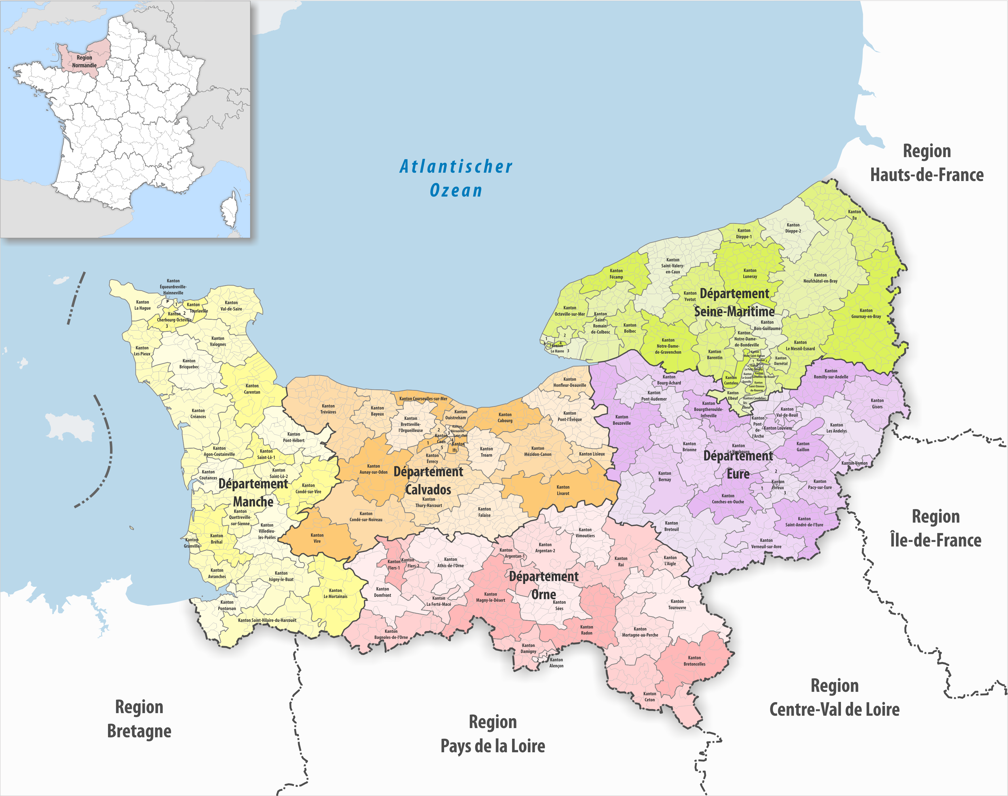 Gemeinden, Kantone und Departemente in der Region Normandie